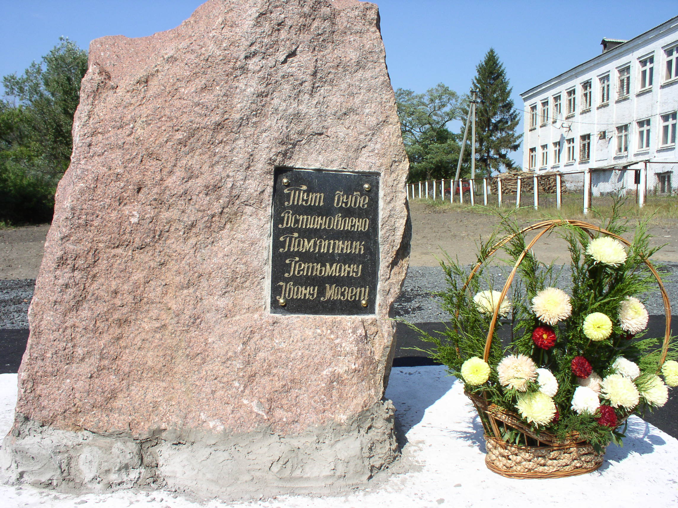 Памятный камень в Коломаке, где будет установлен монумент гетману Мазепе